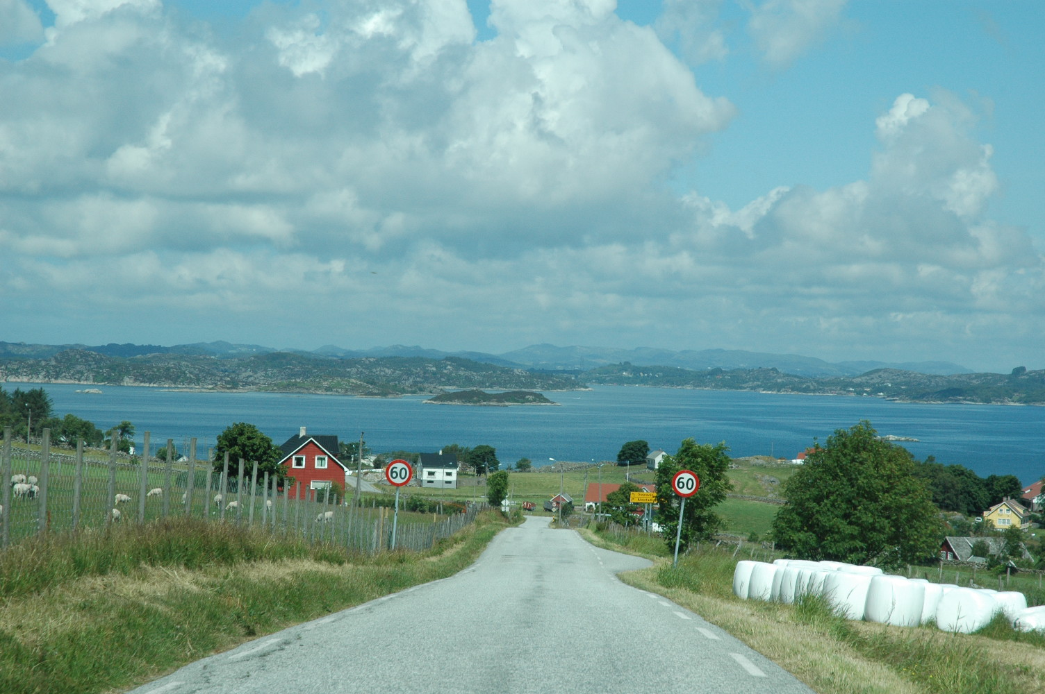 Mot Føresvik